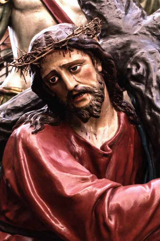 La Veronica Una Delle 16 Vare Usata Durante il Giovedi Santo a Caltanissetta Foto Di Giuseppe Sanalitro